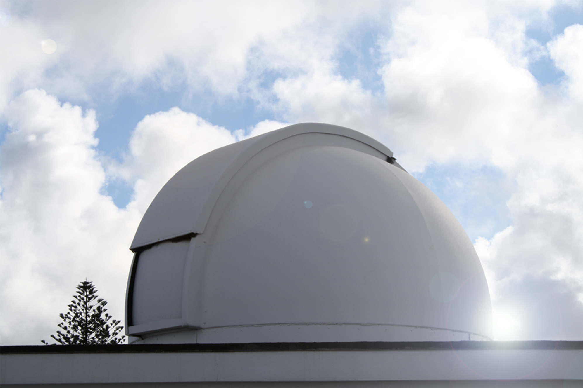 Cúpula do Obsérvatório Astronómico de Santana.